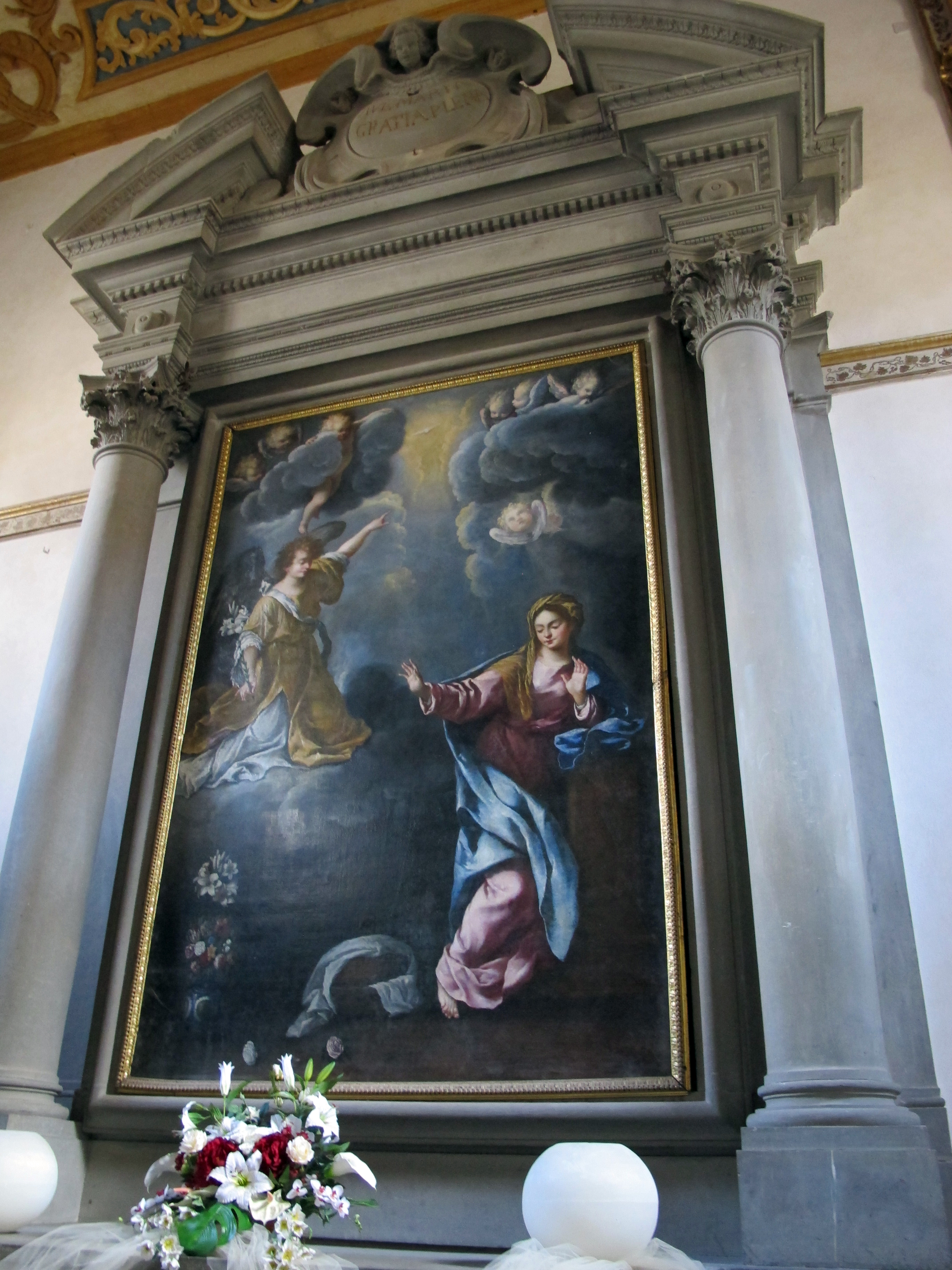 San miniato, ex-san martino, int., Giovanni Battista Vanni, annunciazione